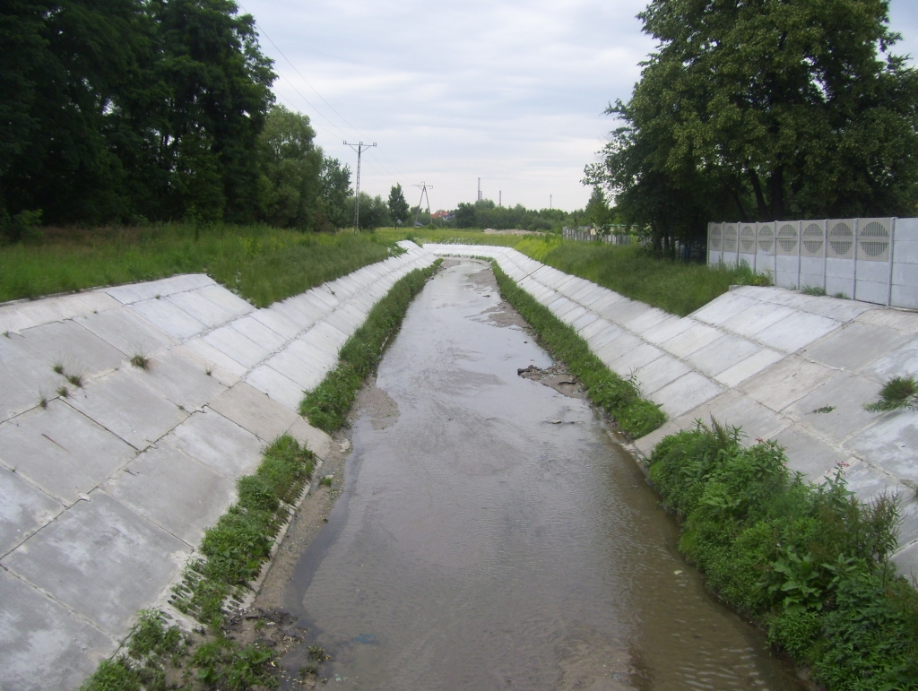 Jasień River